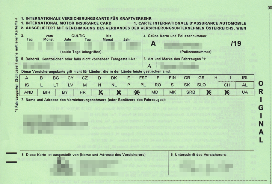 Internationale Versicherungskarte für Kraftverkehr (IVK, auch "Grüne Karte" genannt)